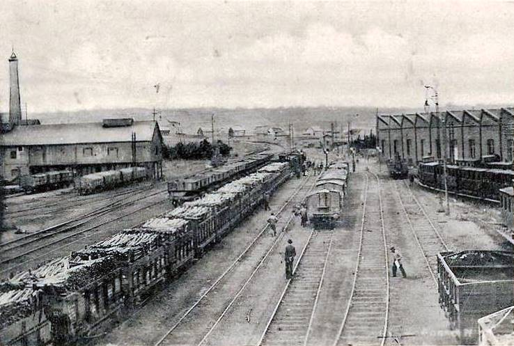 Fosse N°2 des Mines de Bruay